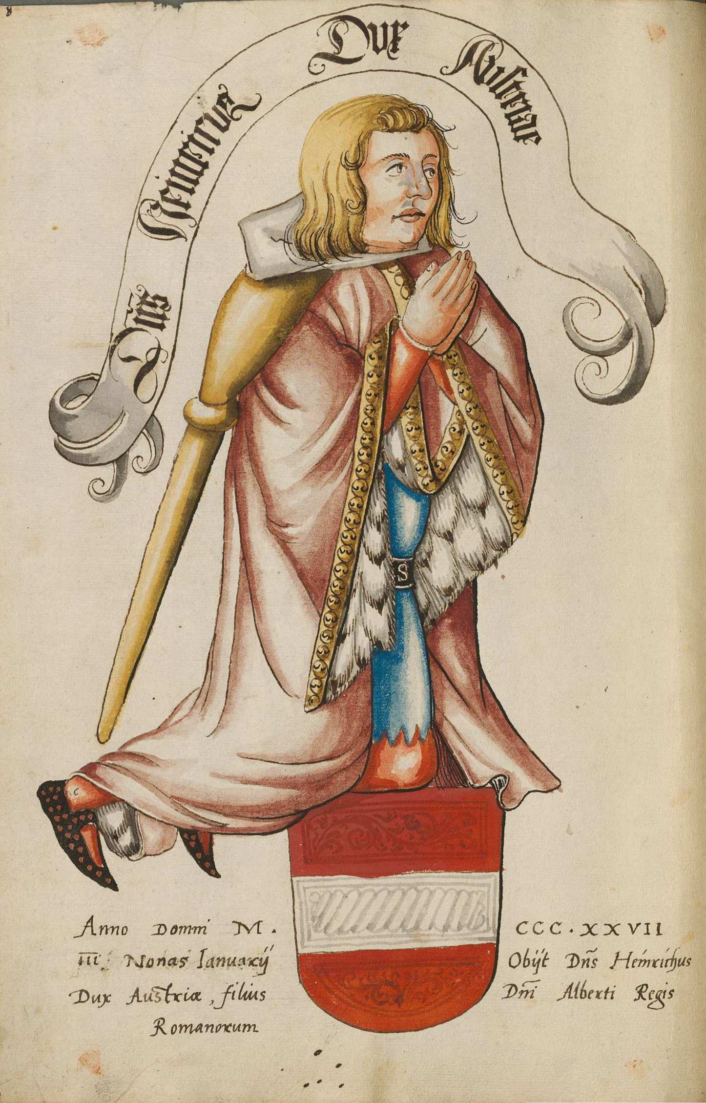 Fürstenbildnisse der Habsburger des 14. Jh. nach den Glasfenstern von Königsfelden/Aargau - BSB Cod.icon. 330 [S.l.] Nordschweiz (Bern ?) um 1560 fol. 17v: Heinrich der Sanftmütige, Herzog von Österreich und Kärnten